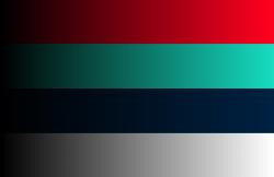 RGBW bars (tritanopia)